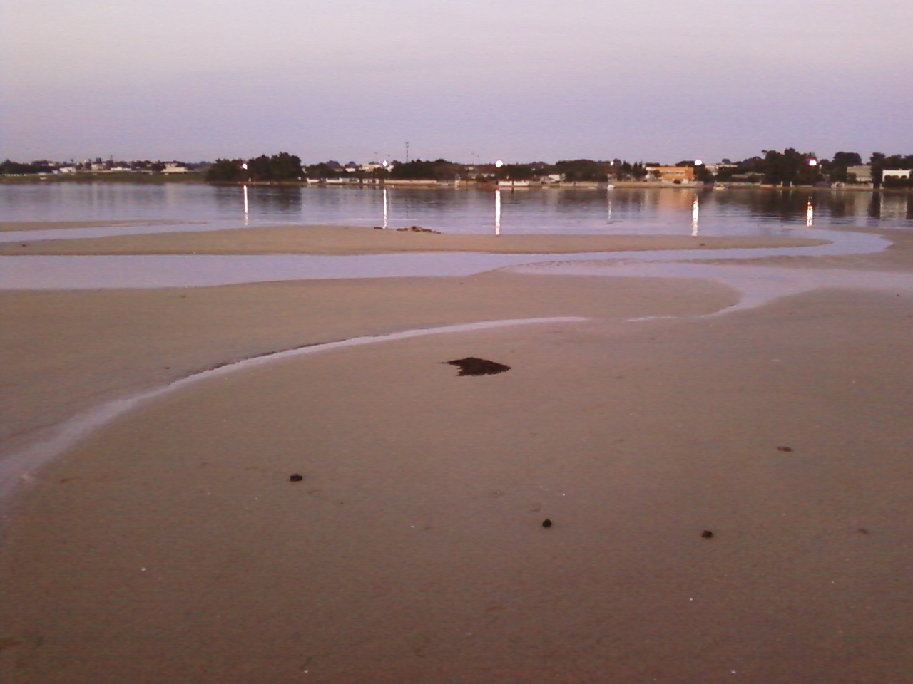 palude alla strea